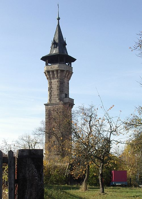 Cadolzburg, Aussichtsturm (sog. „Bleistift“) von SO (2003-11-09), dat. 1893, groß